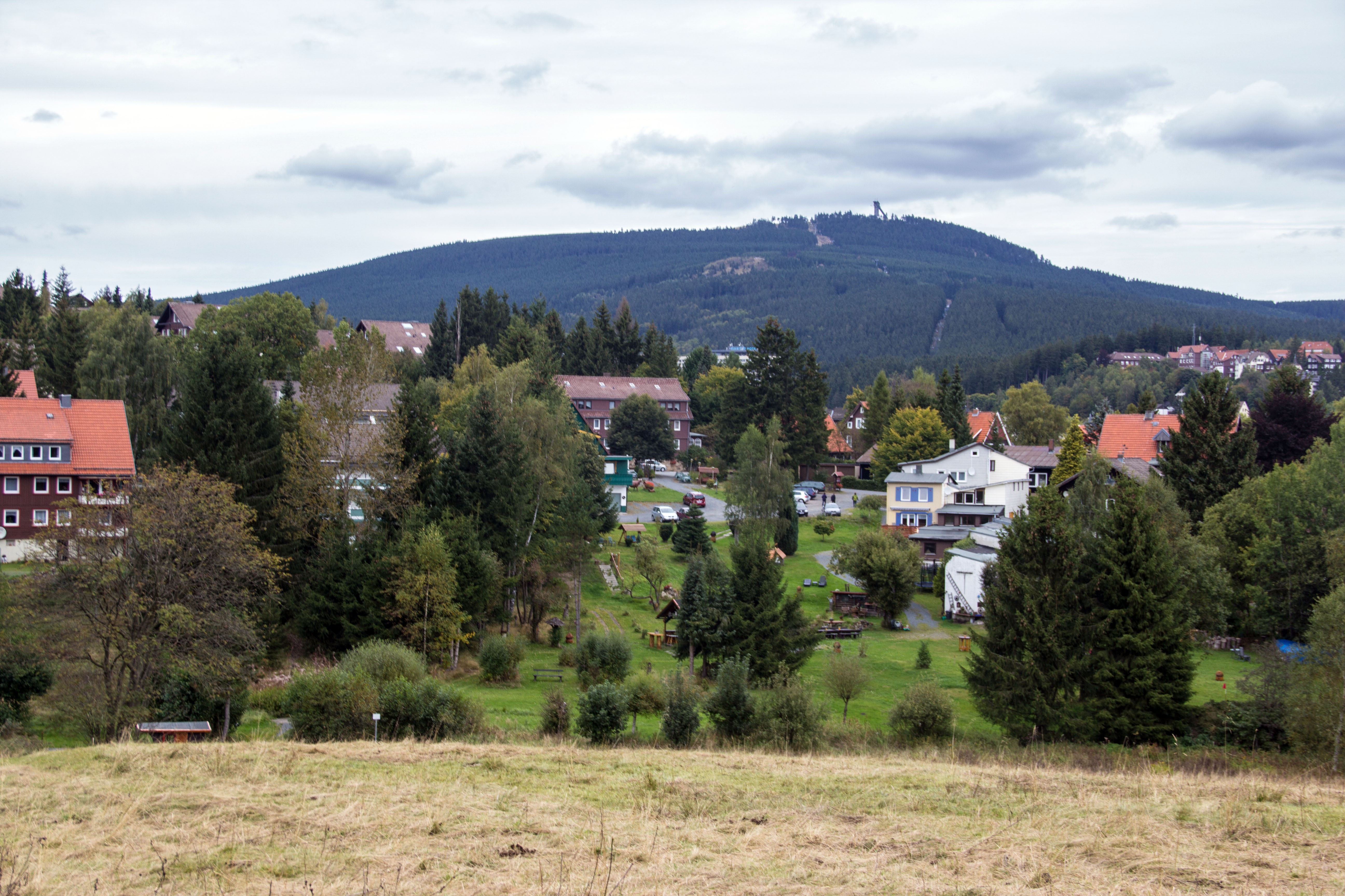 Blick auf Braunlage